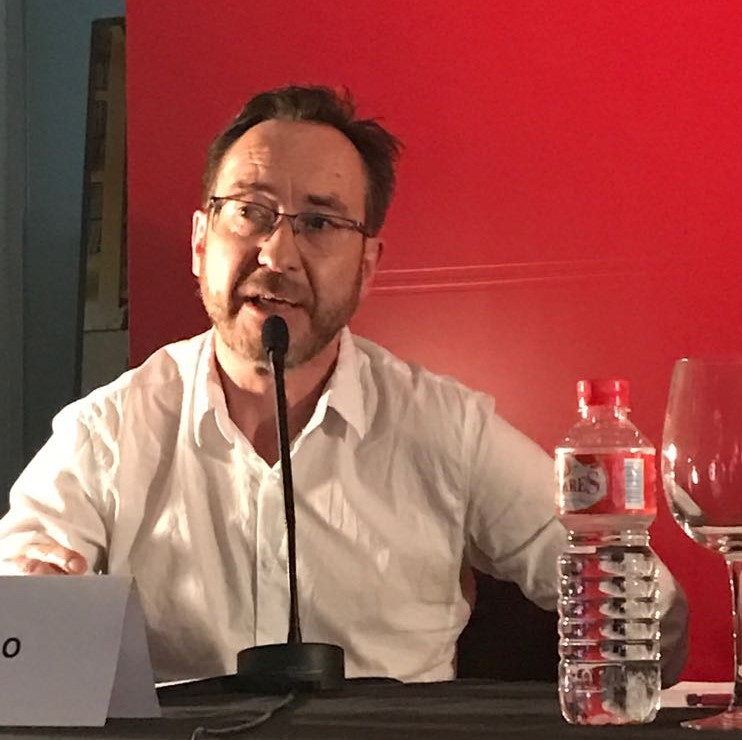 Suso Mourelo en una conferencia.